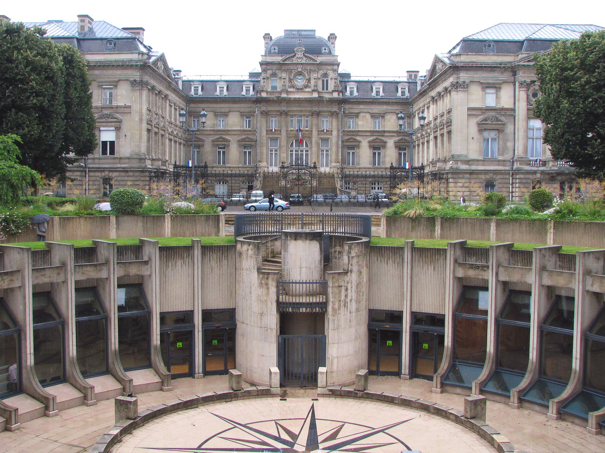 Place de la Republique, Metro, La Préfecture du Nord - Lille, France - Foto Wolfgang Pehlemann Steinberg IMG_1533